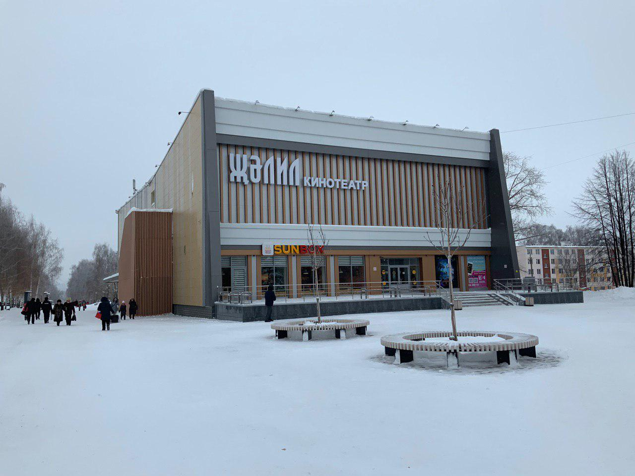 Культурно-развлекательный комплекс «Джалиль». Нижнекамск